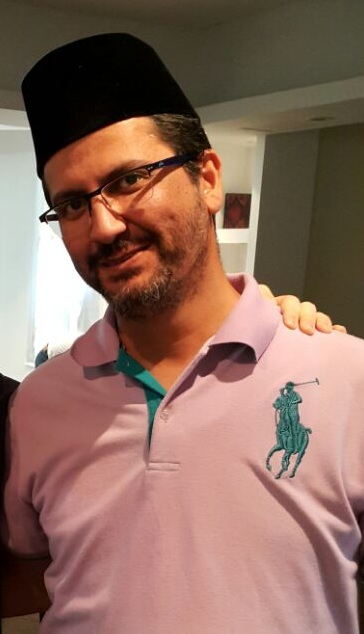 מועד עודה. מזכ"ל העדה האחמדית בישראל